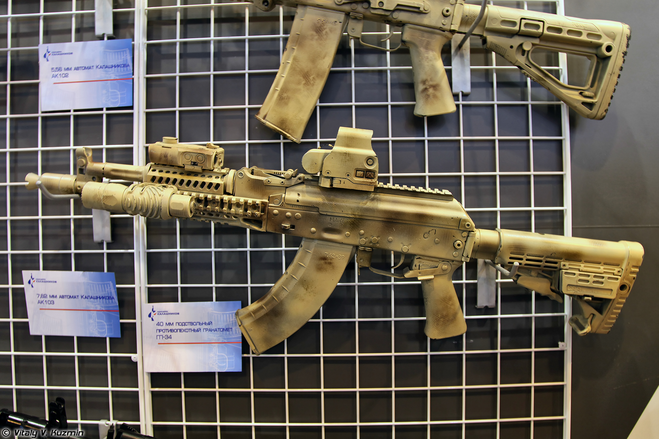 Автомат АК-104 (AK-104 assault rifle)